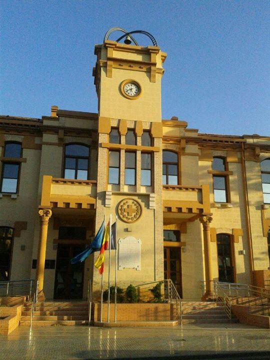 Antiguo Hospital de la Cruz Roja